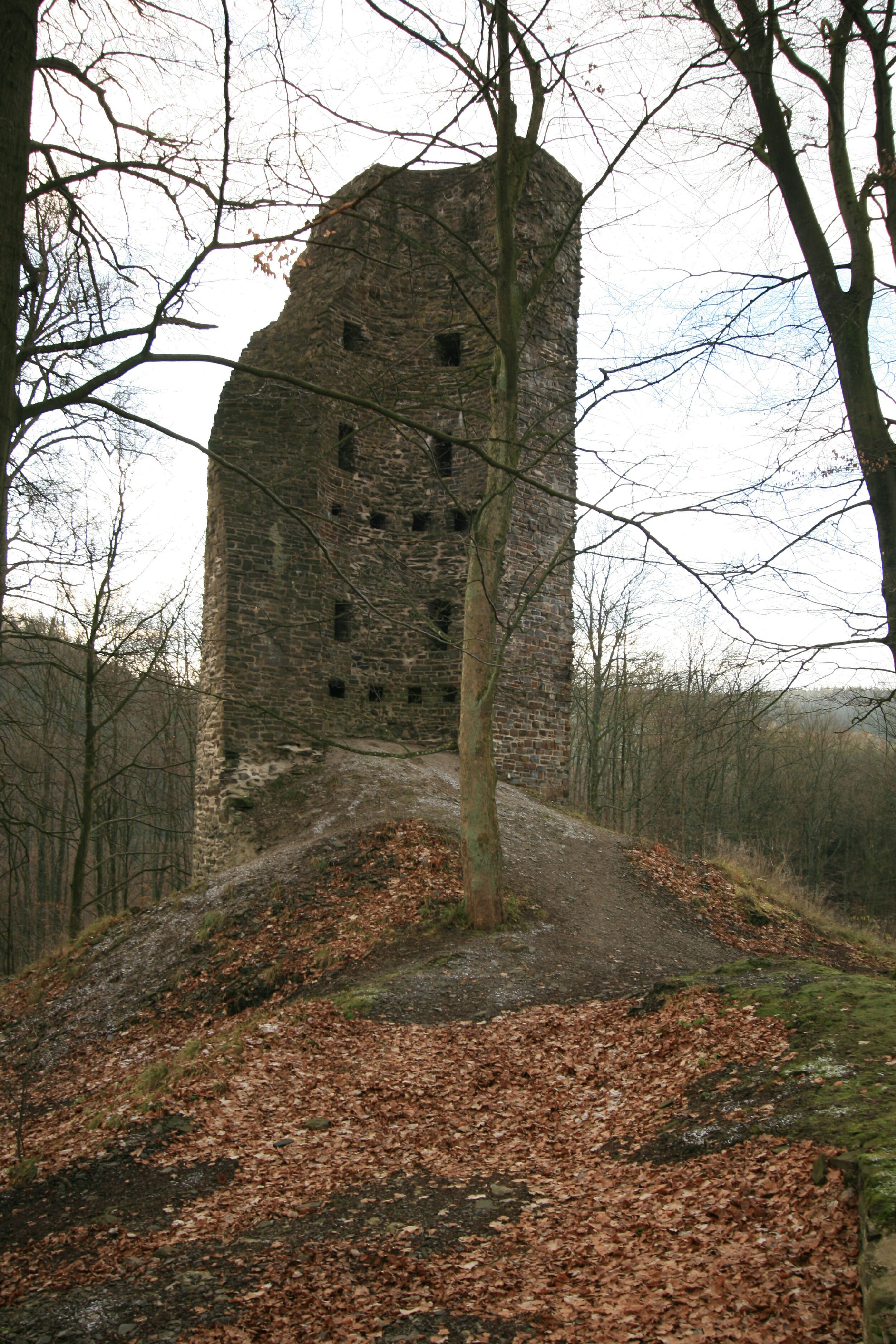 Burg Waldenburg ( Attendorn) Blick nach Süd-West, Ruine des großen Turmes